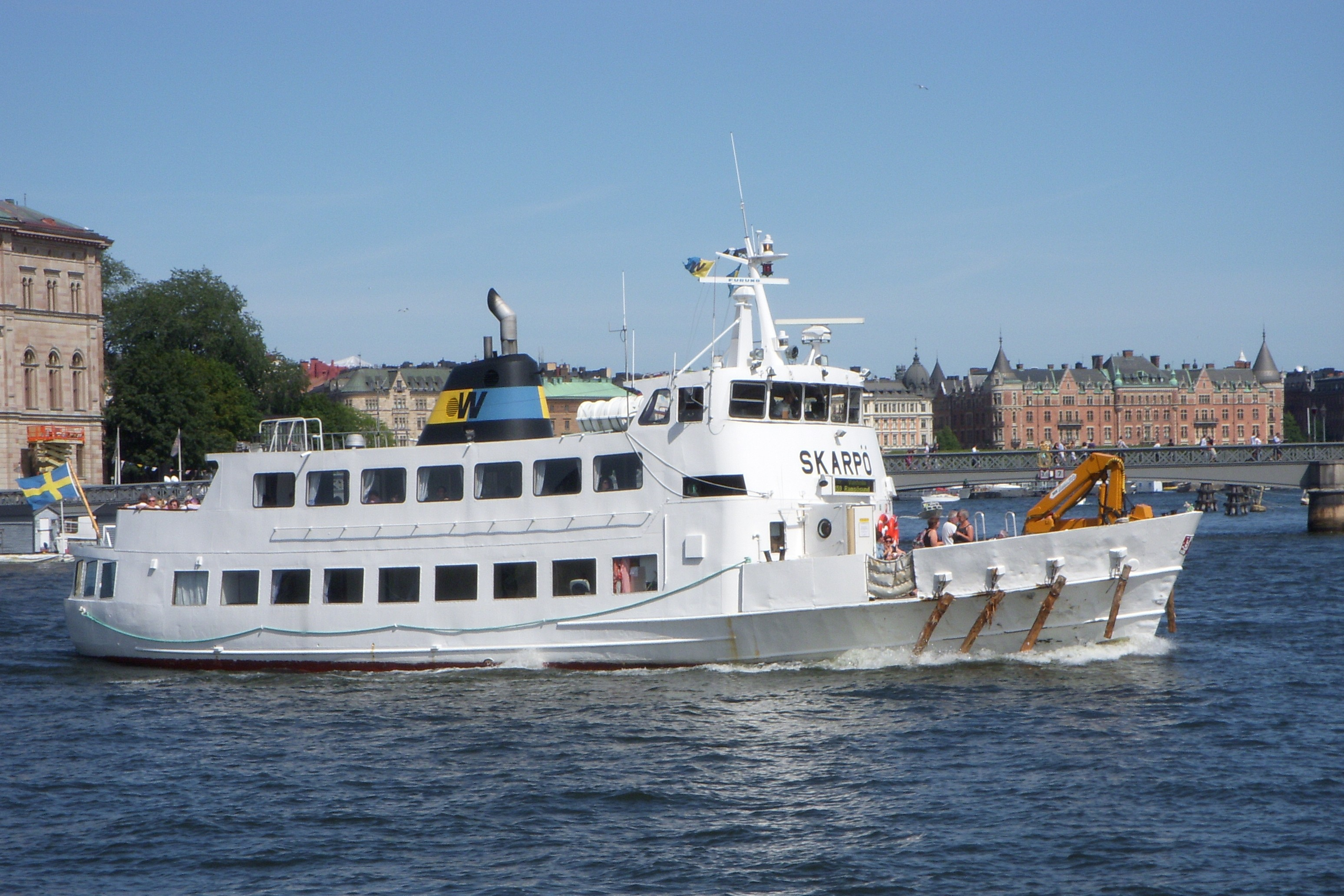 M/S Skarpö på Saltsjön i Stockholm